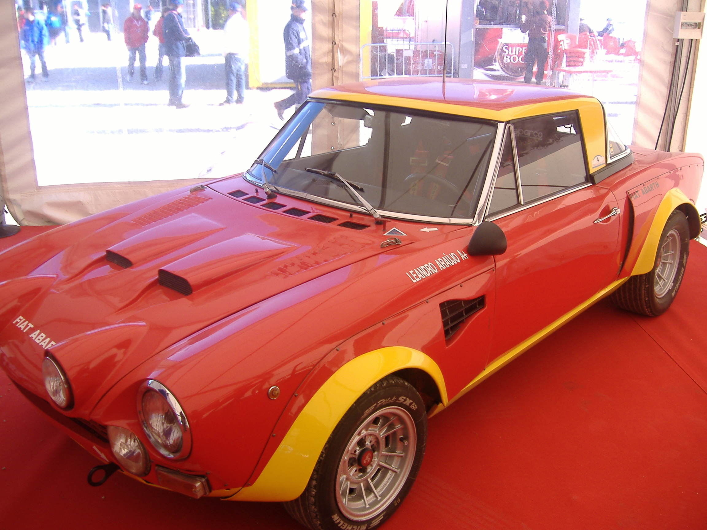 Rali Portugal 2007 -Fiat 124 Abarth Leandro Araujo.